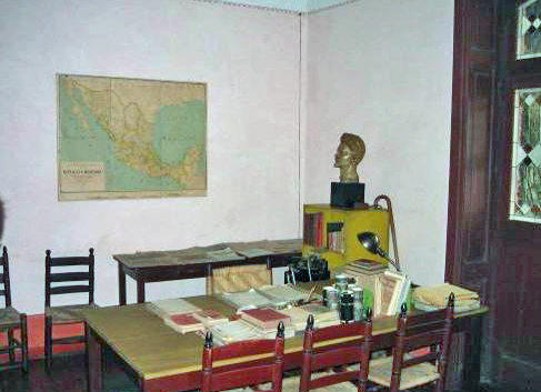 Dem Trotzky säi Büro